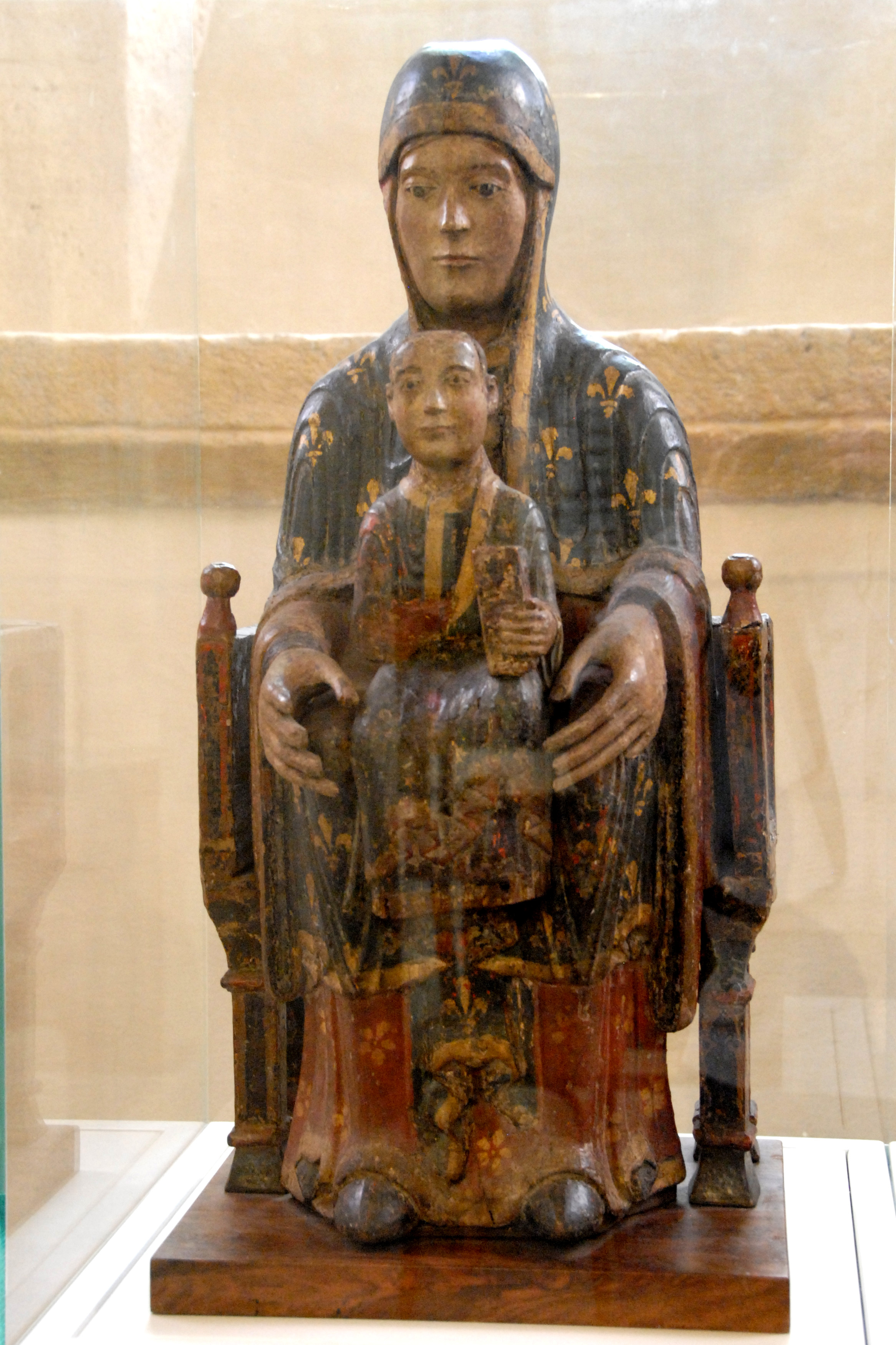 Madonna mit Kind, ND vom Mont-Cornadore